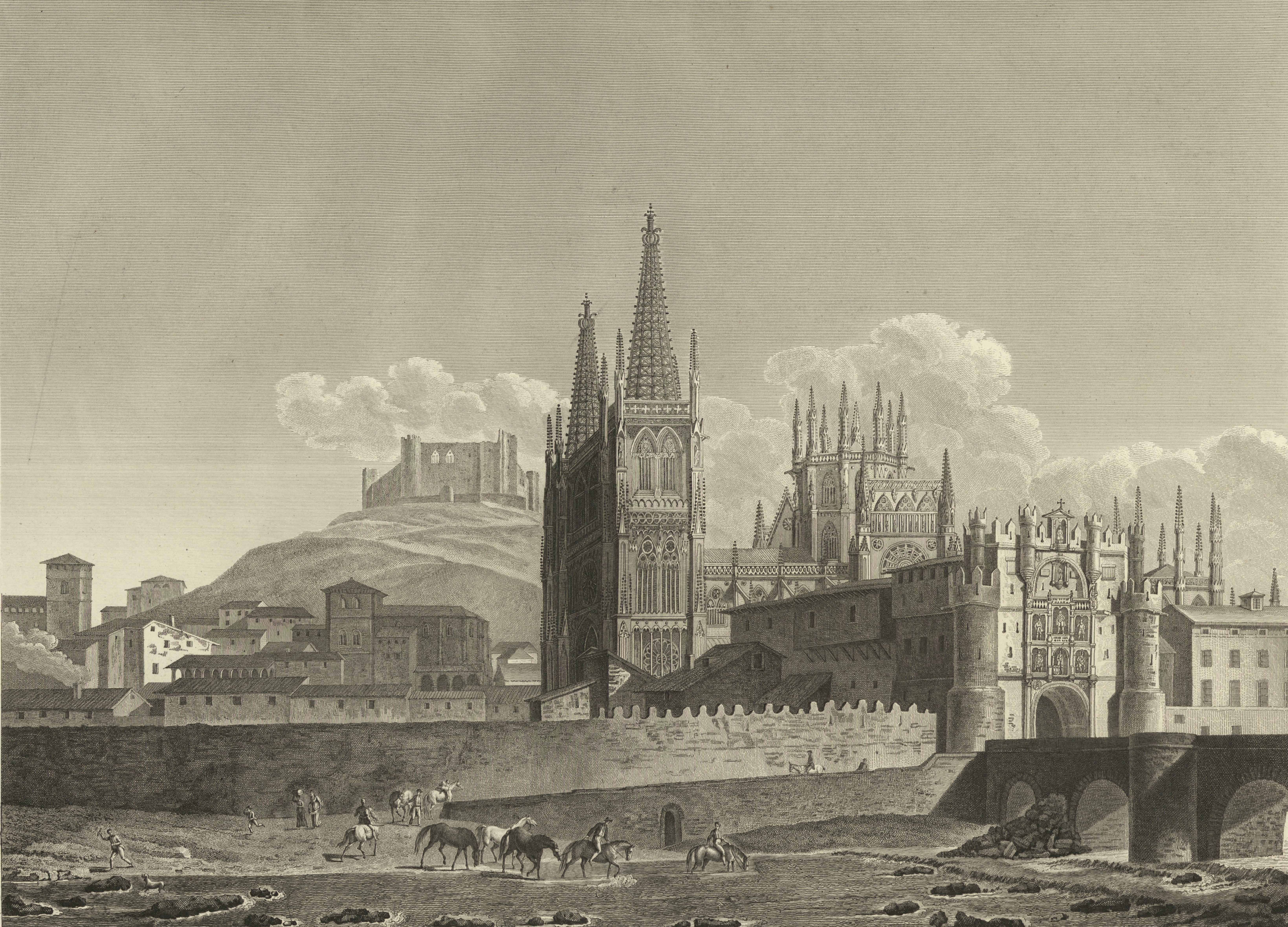 Vista de la puerta triunfal y de la catedral de Burgos.